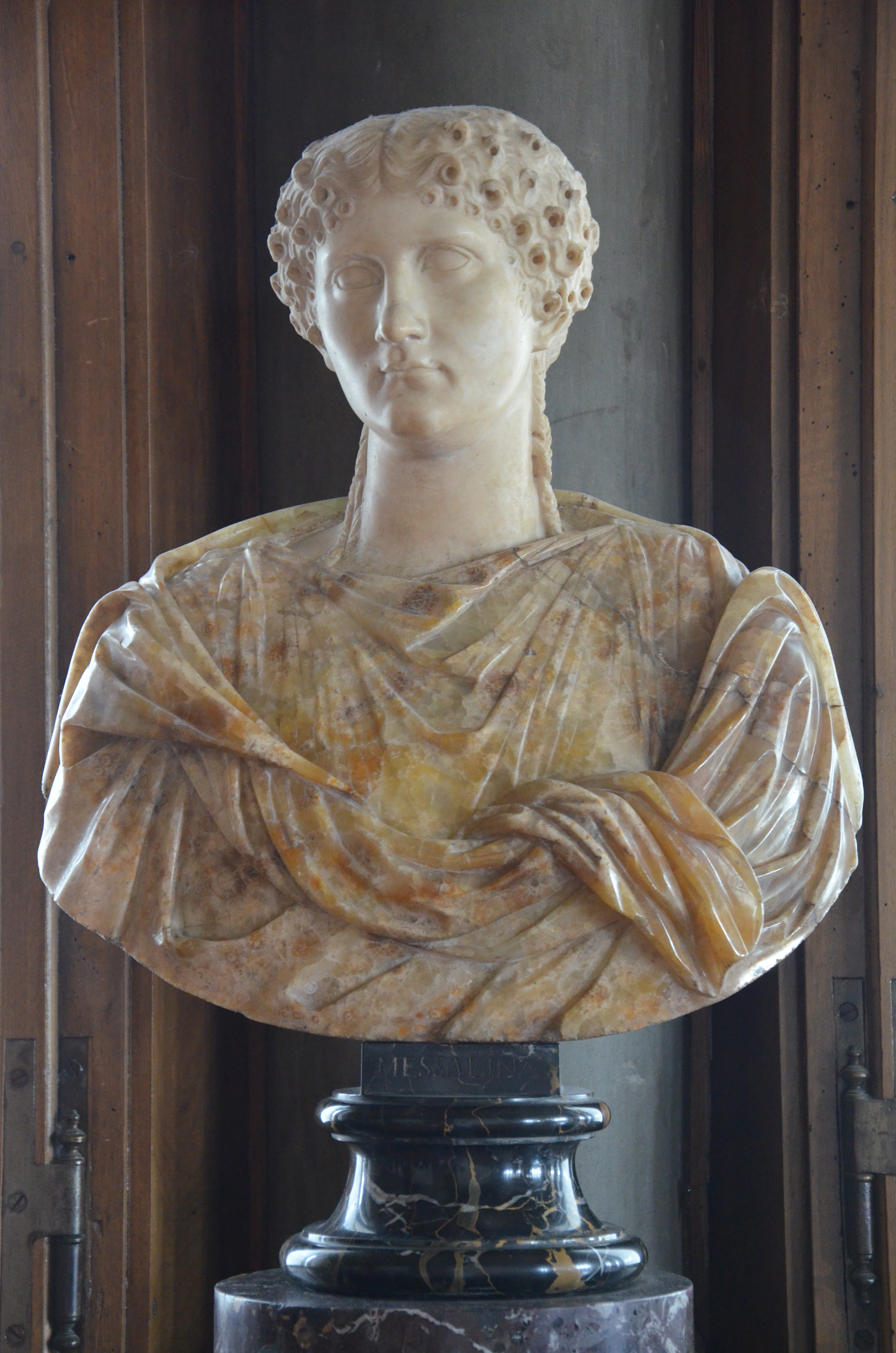 Galleria degli Uffizi, Florence